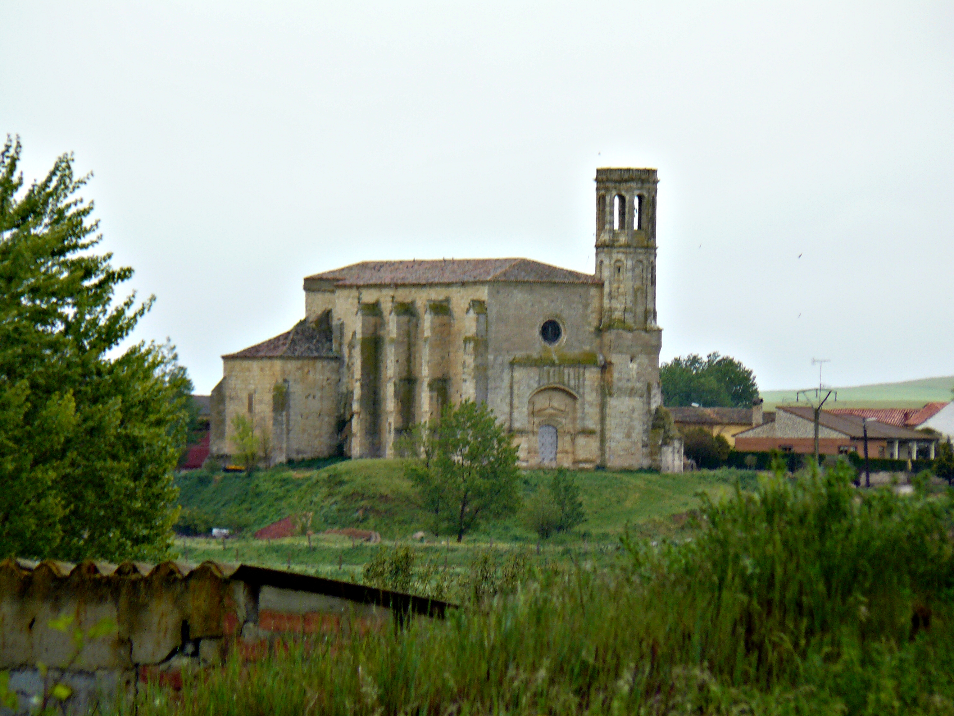 Villanueva de San Mancio desde el canal de Castilla.